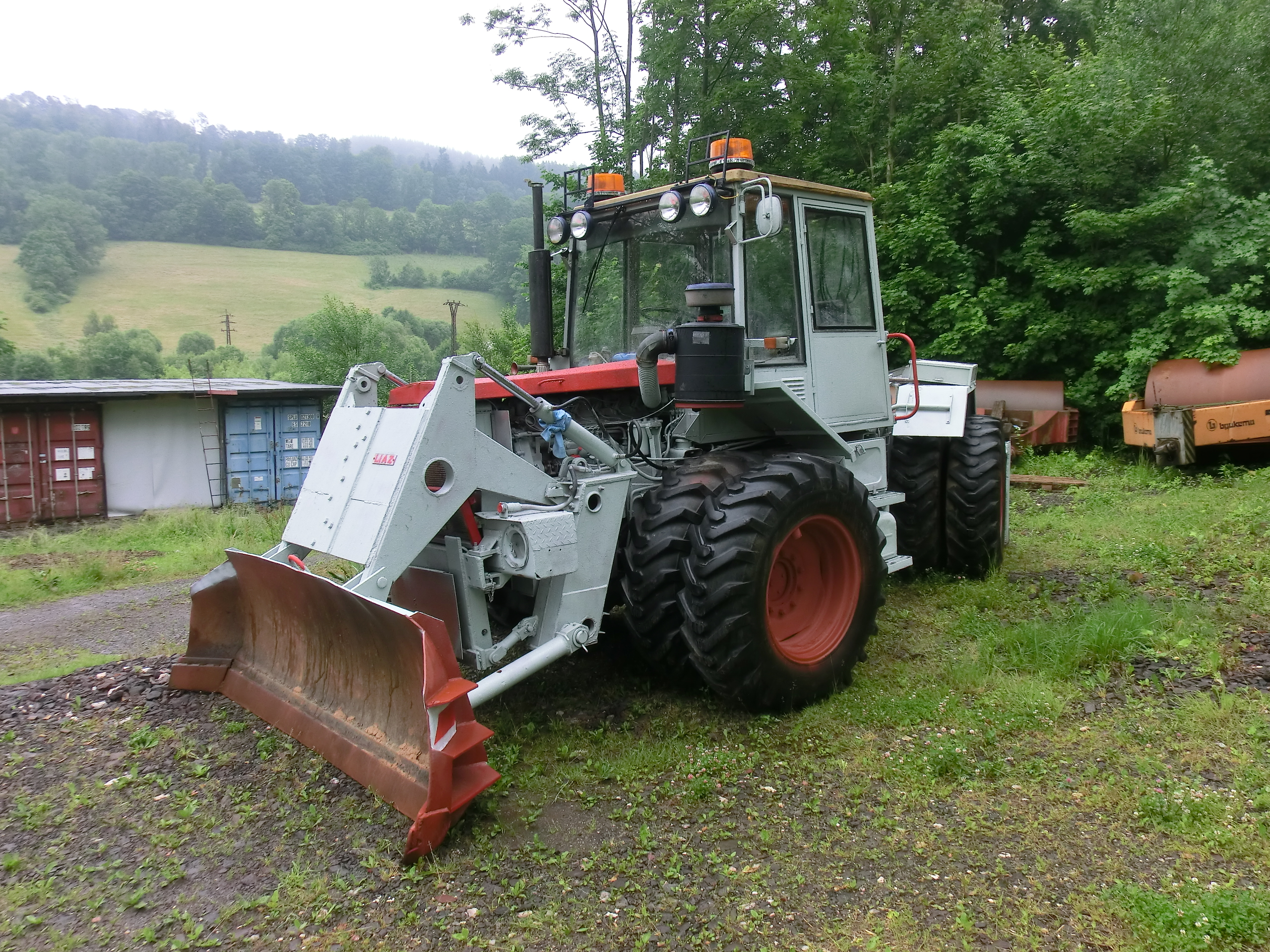 Tahač ŠT-180 ve verzi pro stavební mechanizaci.